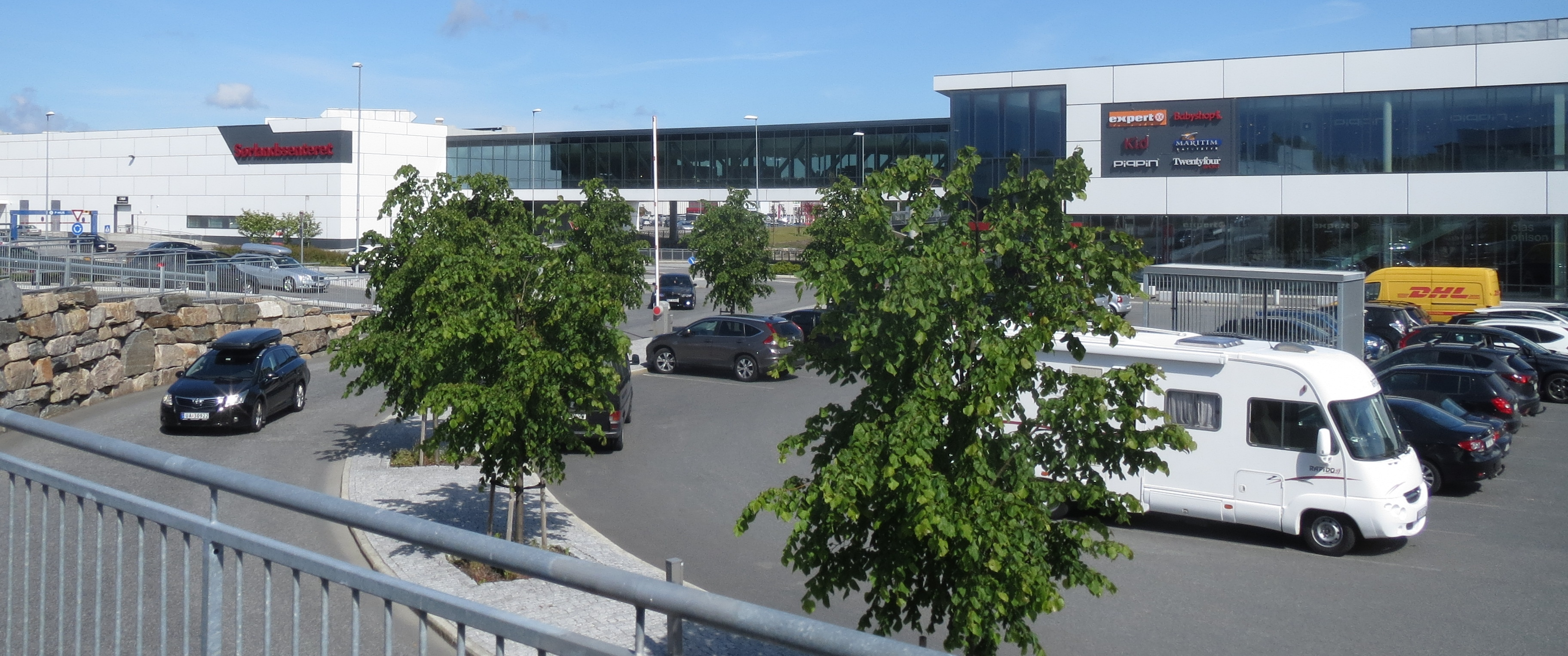 Sørlandssenteret, KristiansandNorsk bokmål: Sørlandssenteret, Kristiansand